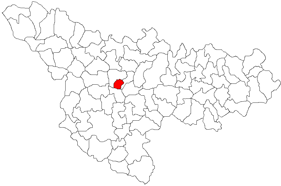 Timişoara, judetul Timis Licensing Categorie:Hărţi ale judeţului Timiş